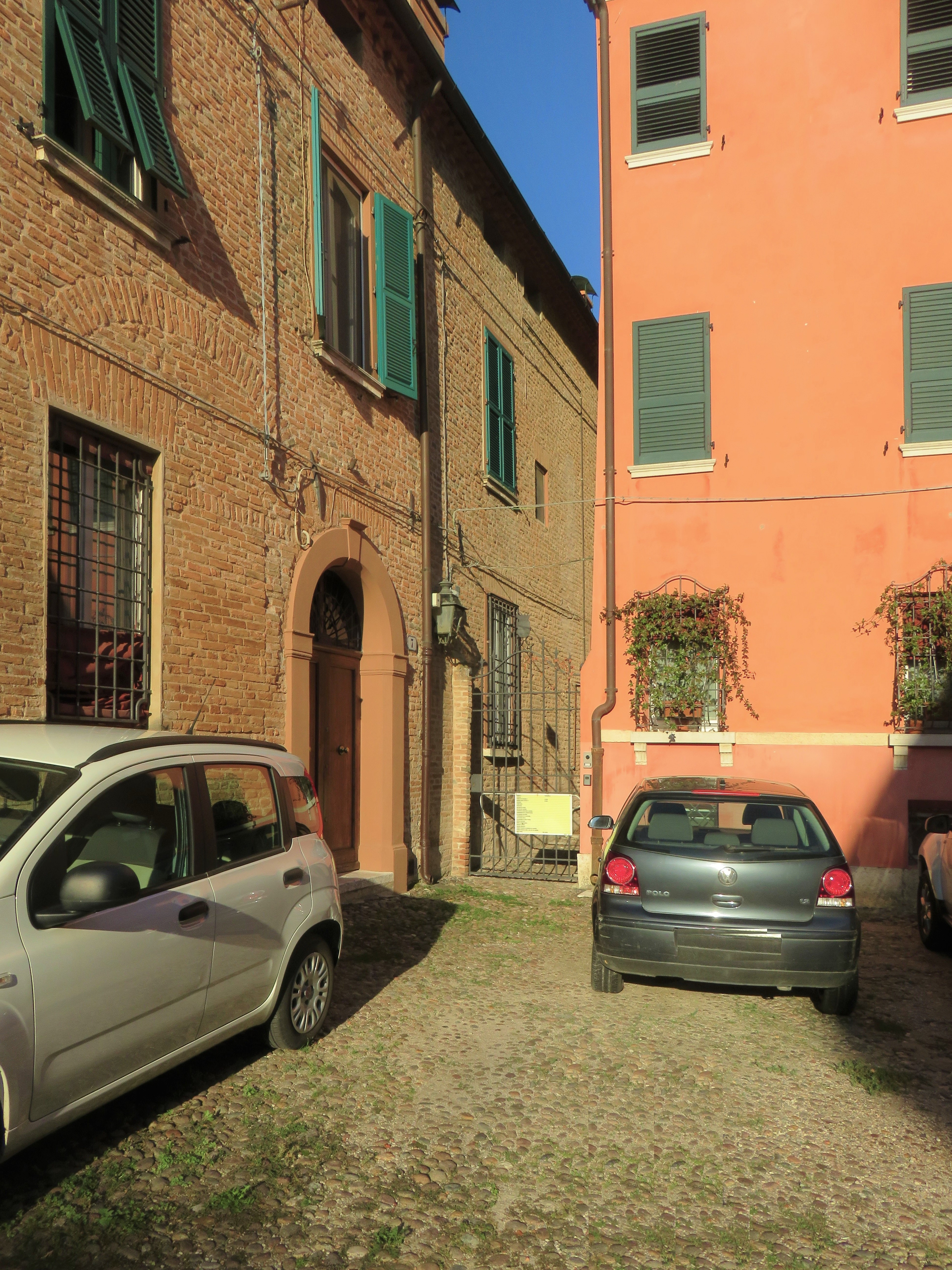 Piazzetta San Michele, accesso al vicolo dei Duelli